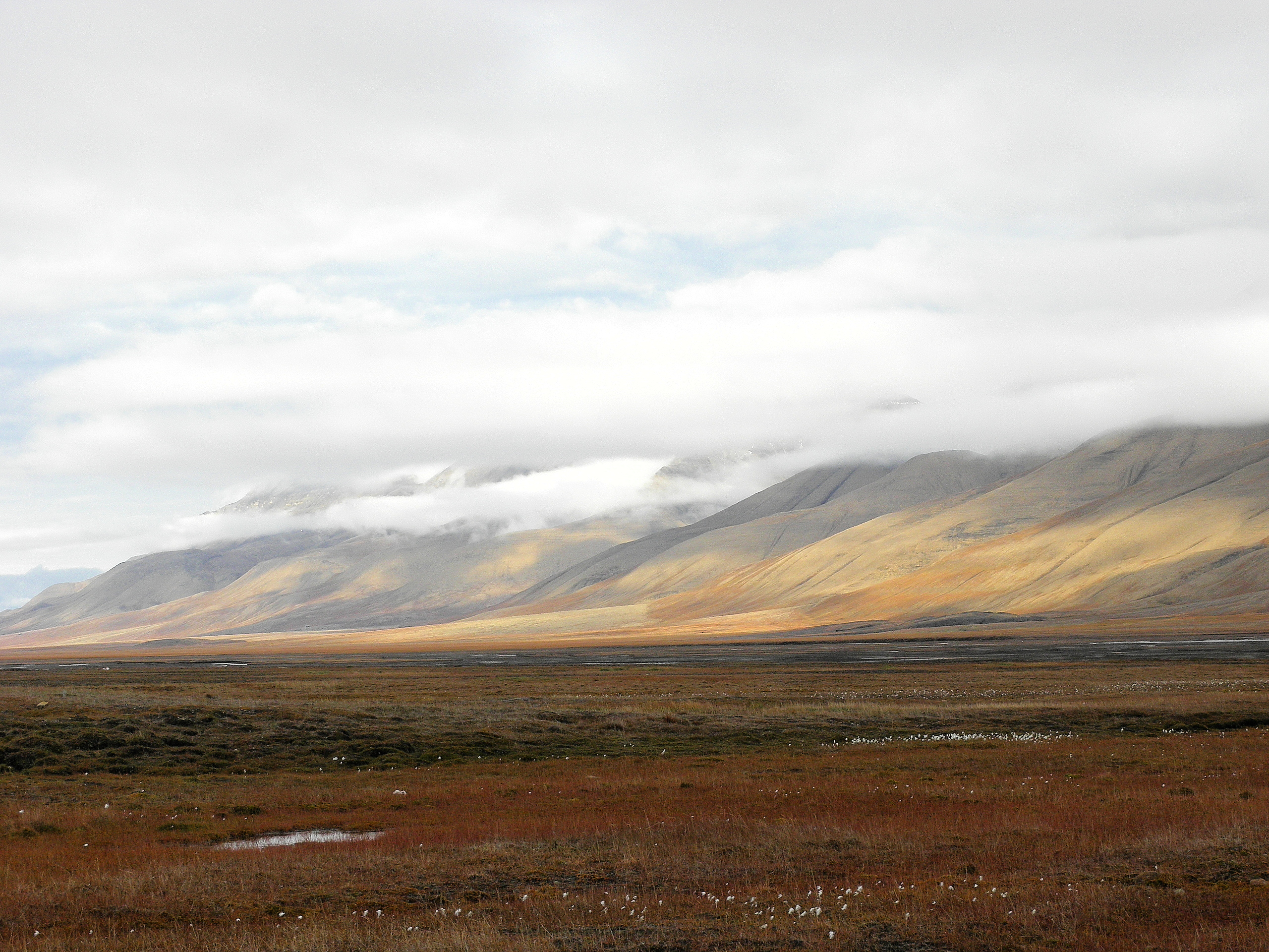 Svalbard tundra and mountains, autumn.